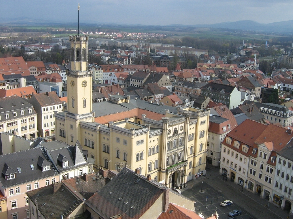 Zittau (Sachsen). Blick vom Turm der evangelischen Kirche aufs Rathaus